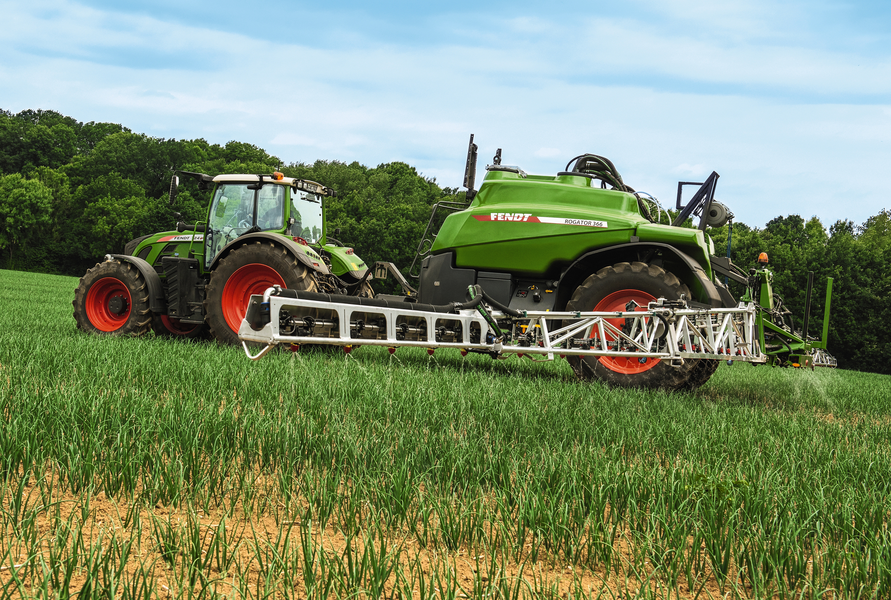 Fendt Rogator 366